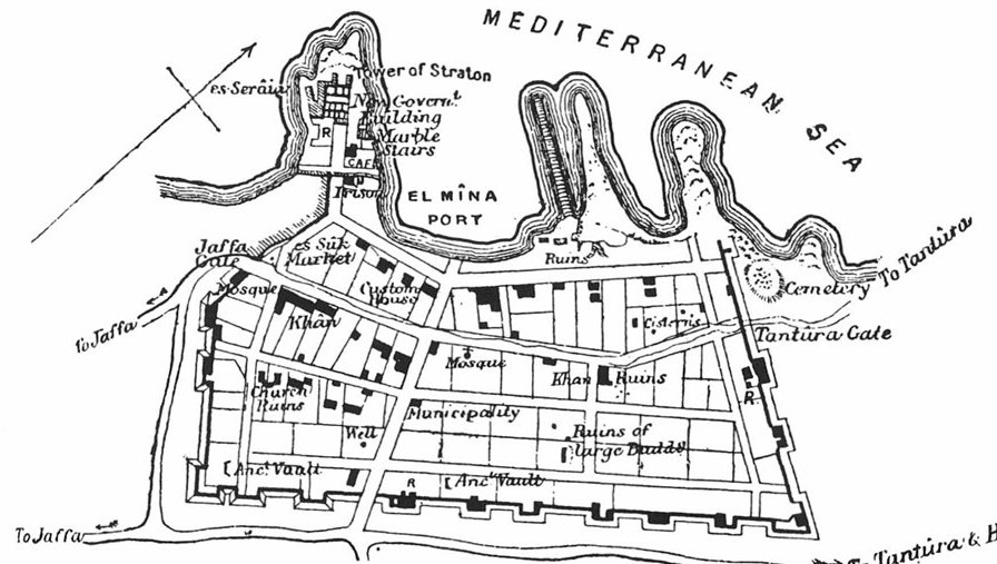 מפת קיסריה